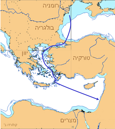 אוניית המעפילים קולורדו - מסלול 2